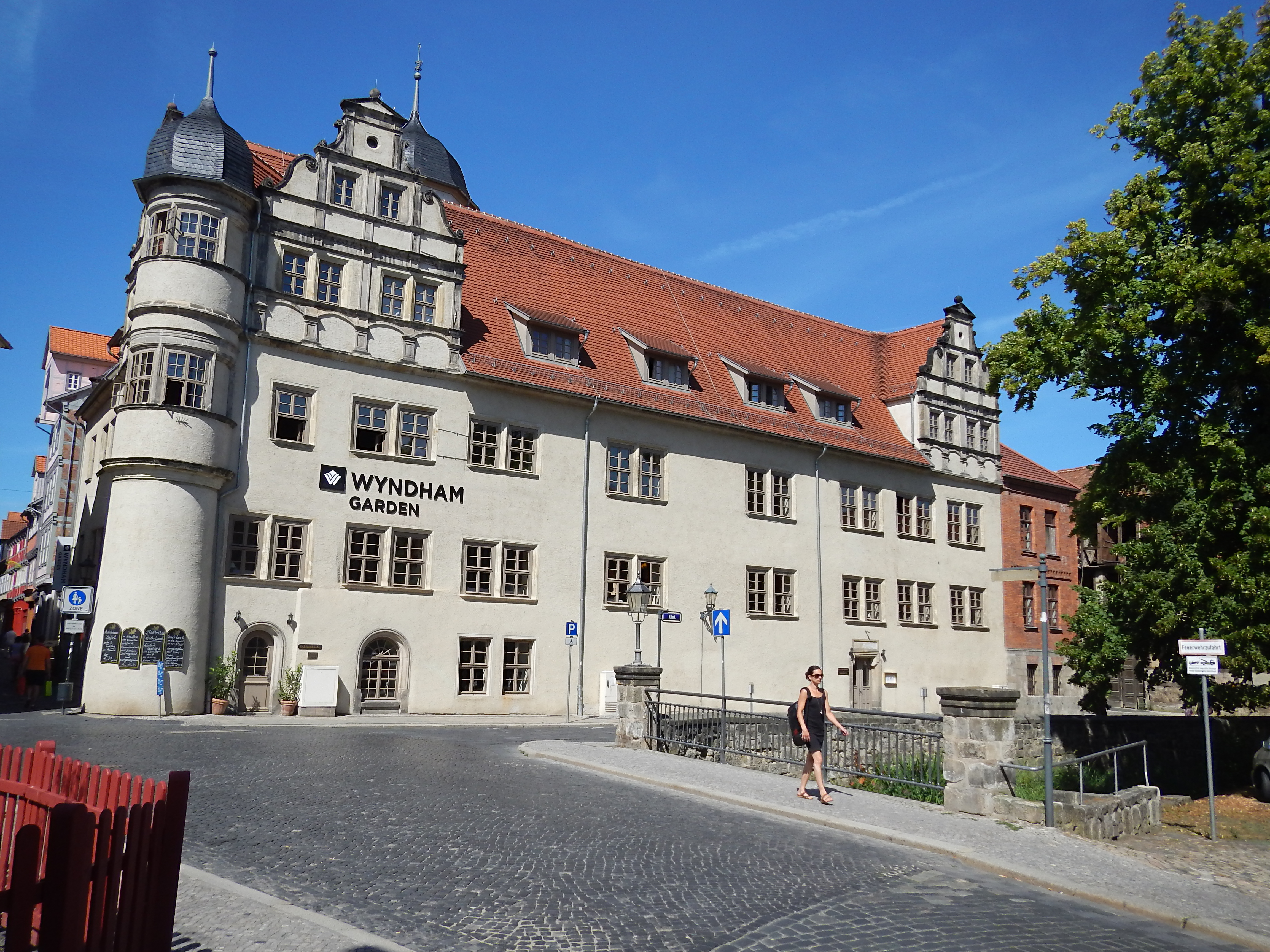 Quedlinburger Stadtschloss, Bockstraße 6/Klink 11, 06484 Quedlinburg